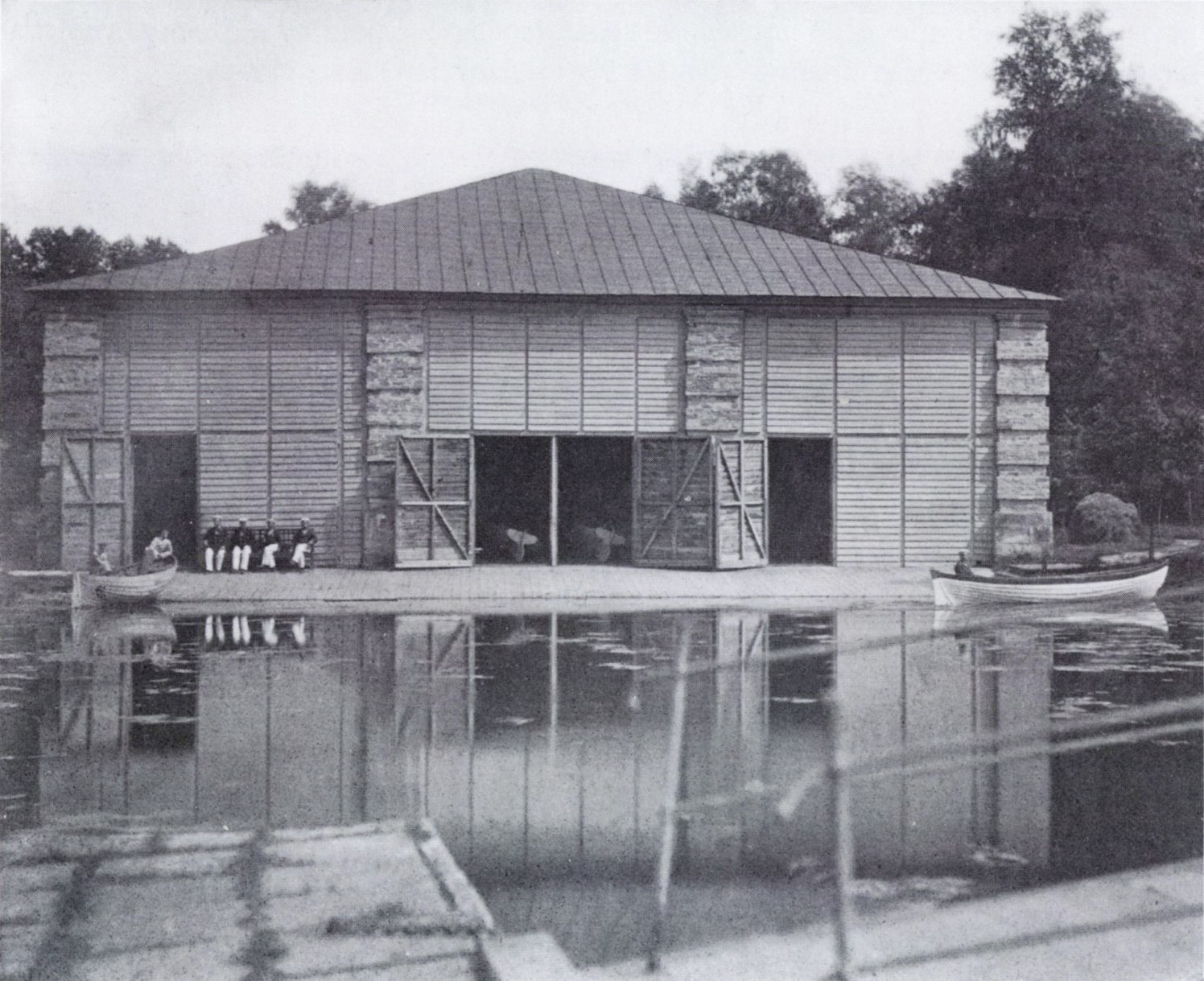 Фотография Адмиралтейства в Гатчине